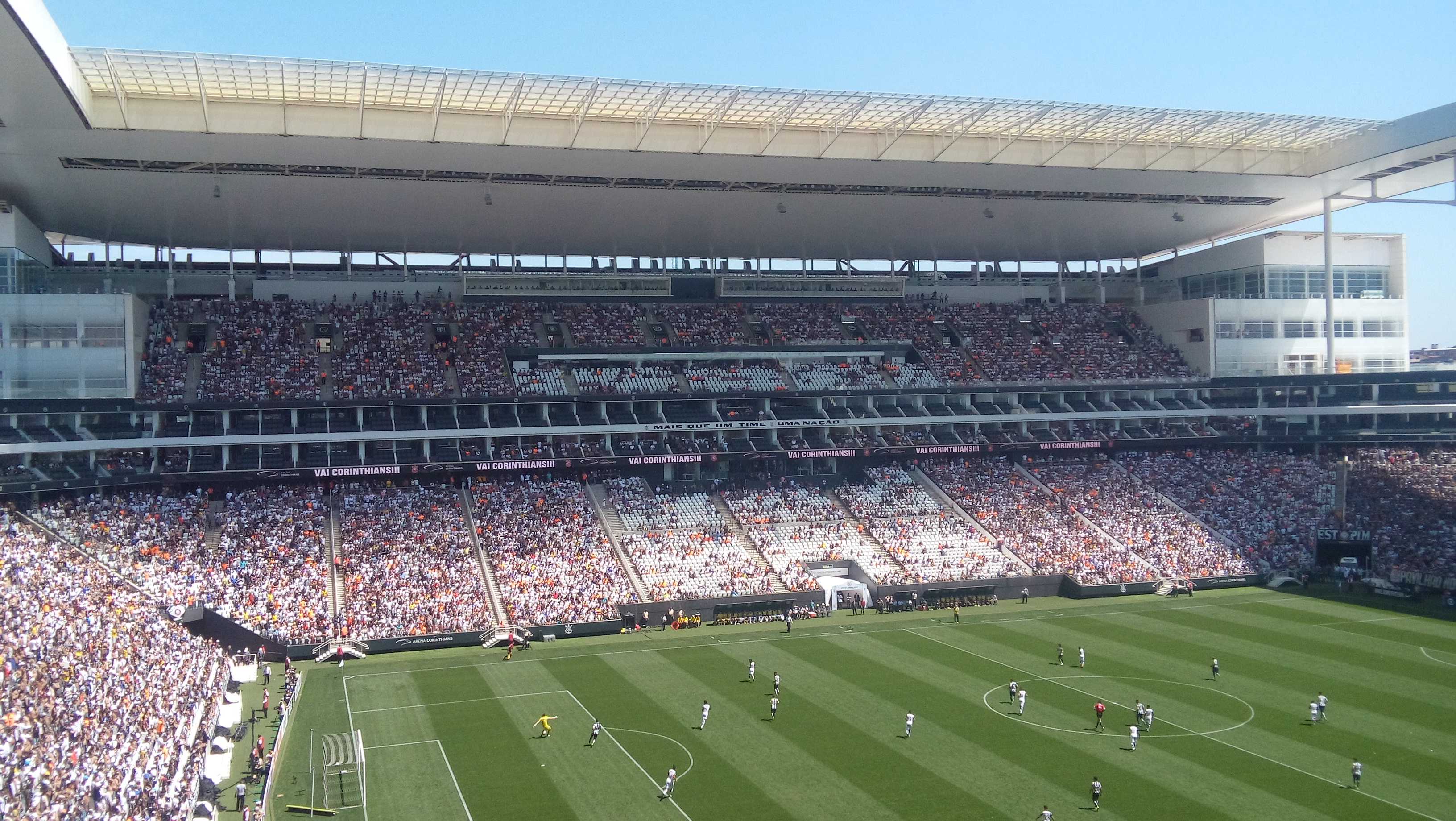 Setor Oeste da Arena Corinthians, no clássico do Timão contra o Santos